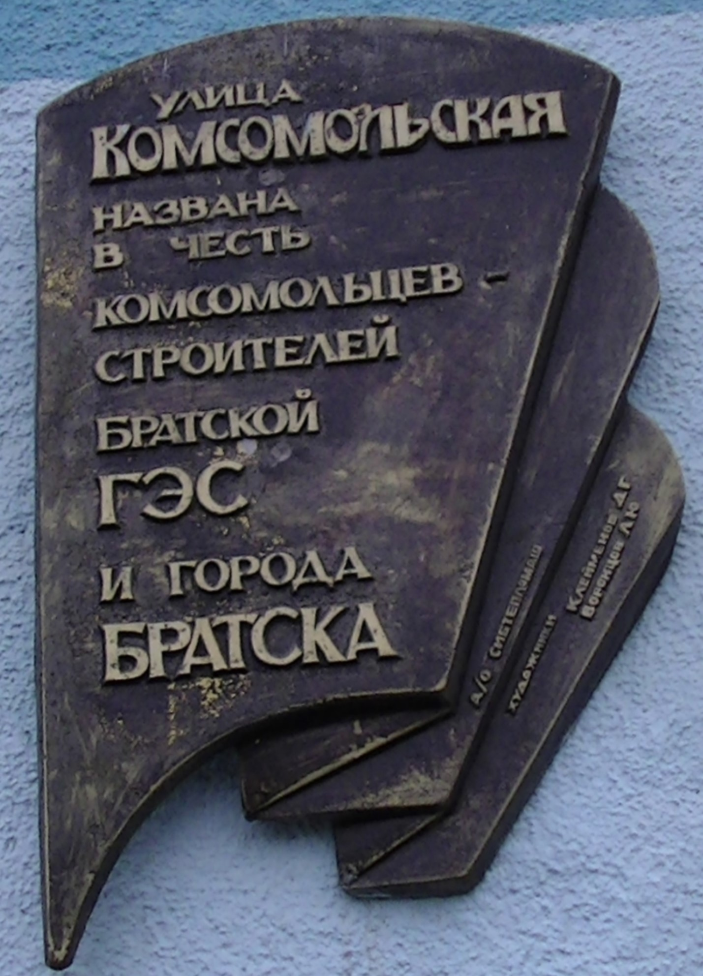 Мемориальная доска комсомольцам - строителям Братской ГЭС и города Братска. Открыта в 1999 году к 80-летию ВЛКСМ